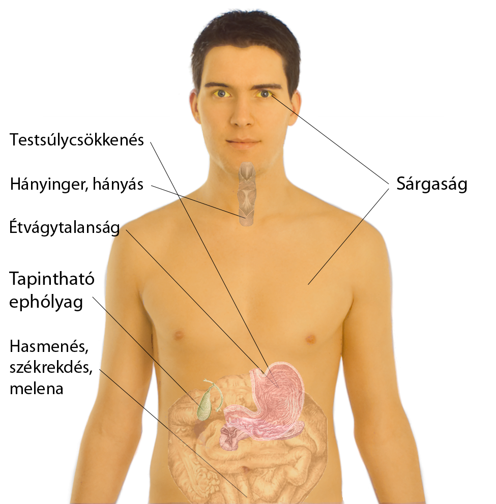 A hasnyálmirigyrák főbb tünetei Felhasznált irodalom: Tapintható epehólyag Anderson A, Bergdahi L: Carcinoma of the pancreas. Am Sung 1976;42:173 és Hines LH, Burns RP:Ten years' experience treating pancreatic and periampullary cancer. Am Sung 1976;42:442 Fogyás, hasmenés, székrekedés, melena, hányinger, hányás, sárgaság Stephen J. McPhee,MD; Vishwanath R.Lingappa,MD,PhD; Jack D.Lange,MD;. Pathophysiology of Disease; An Introduction to Clinical Medicine. A Simon & Schuster Company, 604. o. ISBN 0-8385-7678-8 Anderson A, Bergdahi L: Carcinoma of the pancreas. Am Sung 1976;42:173 és Hines LH, Burns RP:Ten years' experience treating pancreatic and periampullary cancer. Am Sung 1976;42:442